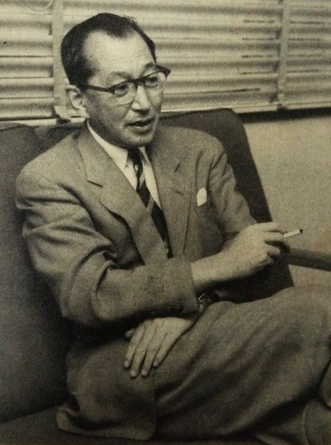 團伊能